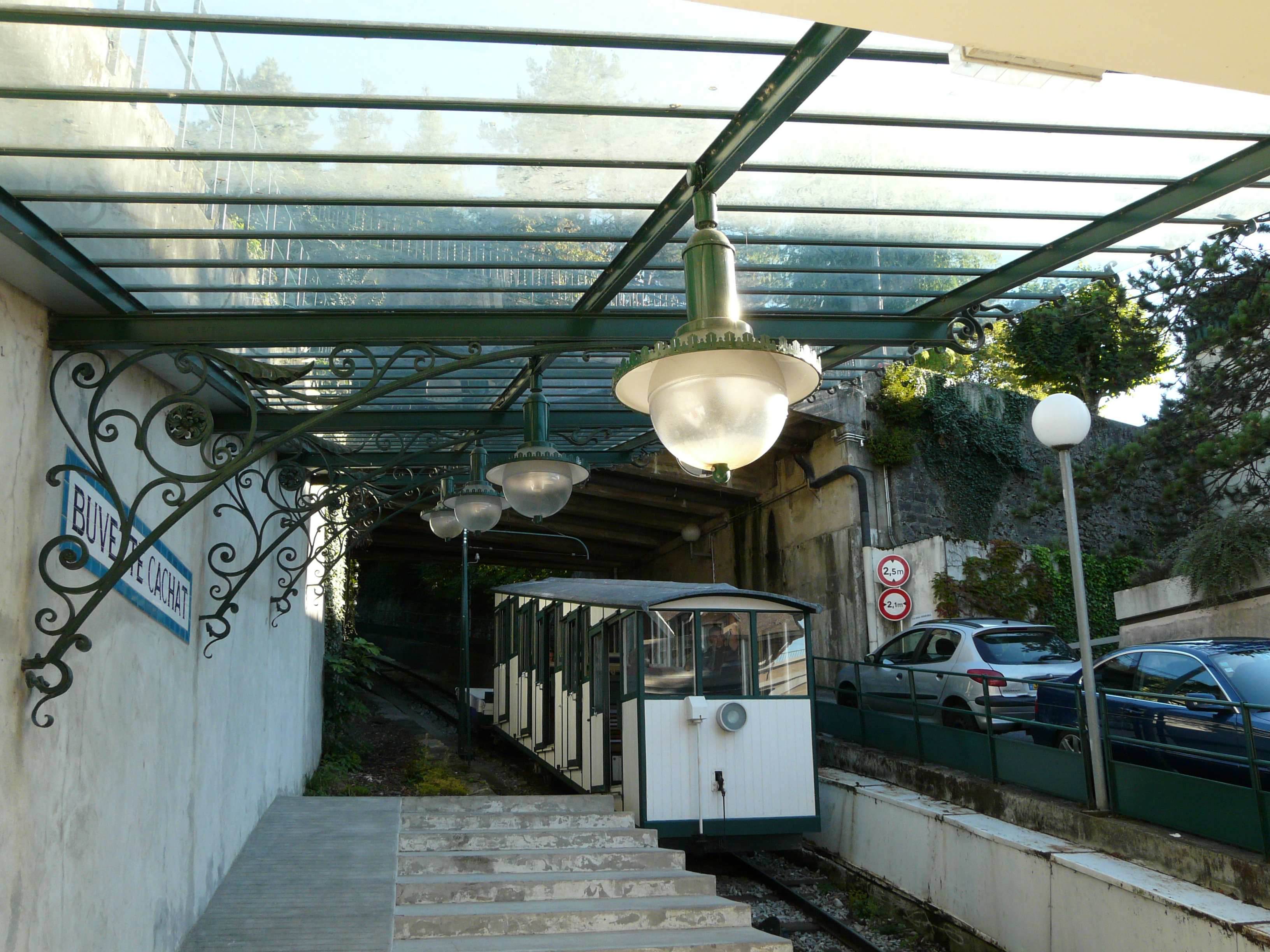 Funiculaire d'Évian-les-Bains à Neuvecelle, station "Buvette Cachat"